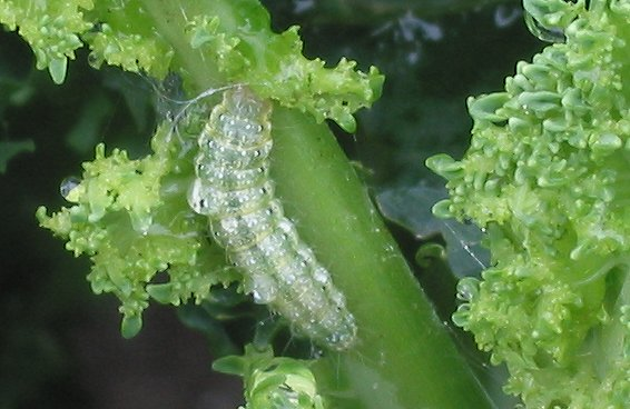 zelfgemaakte foto van de rups van Late koolmot op boerenkool; eind september